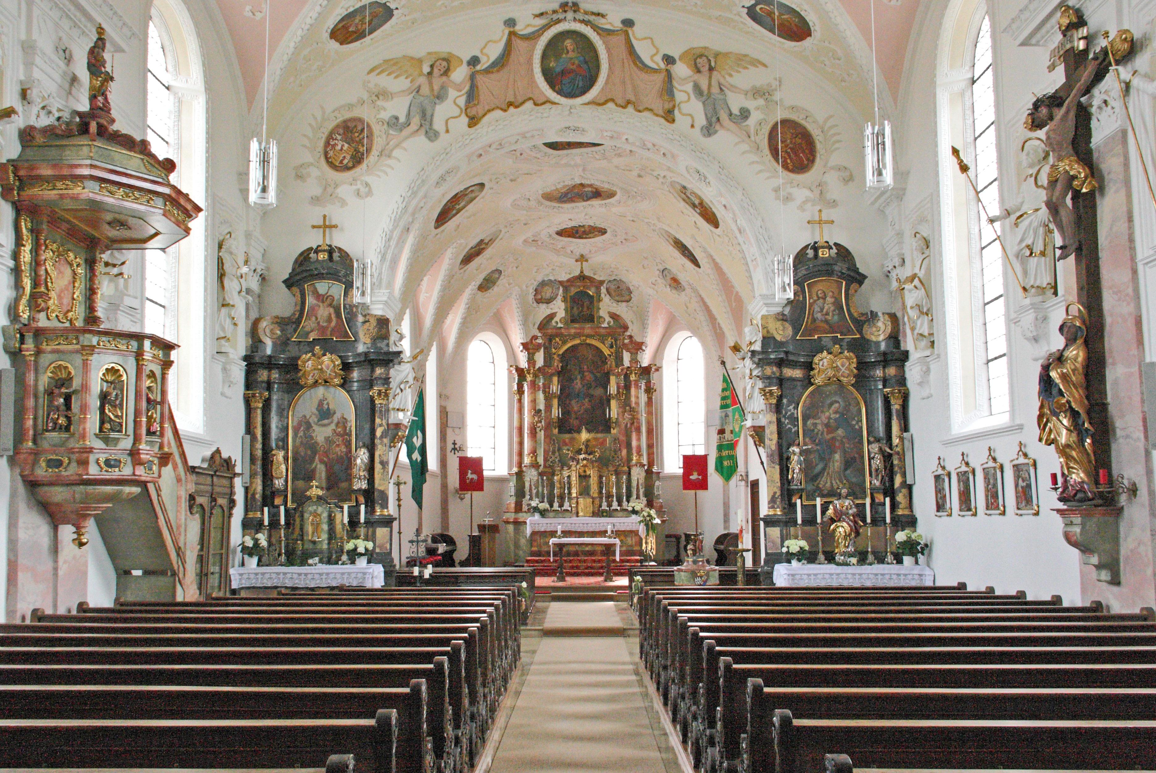 Innenraum der Kirche